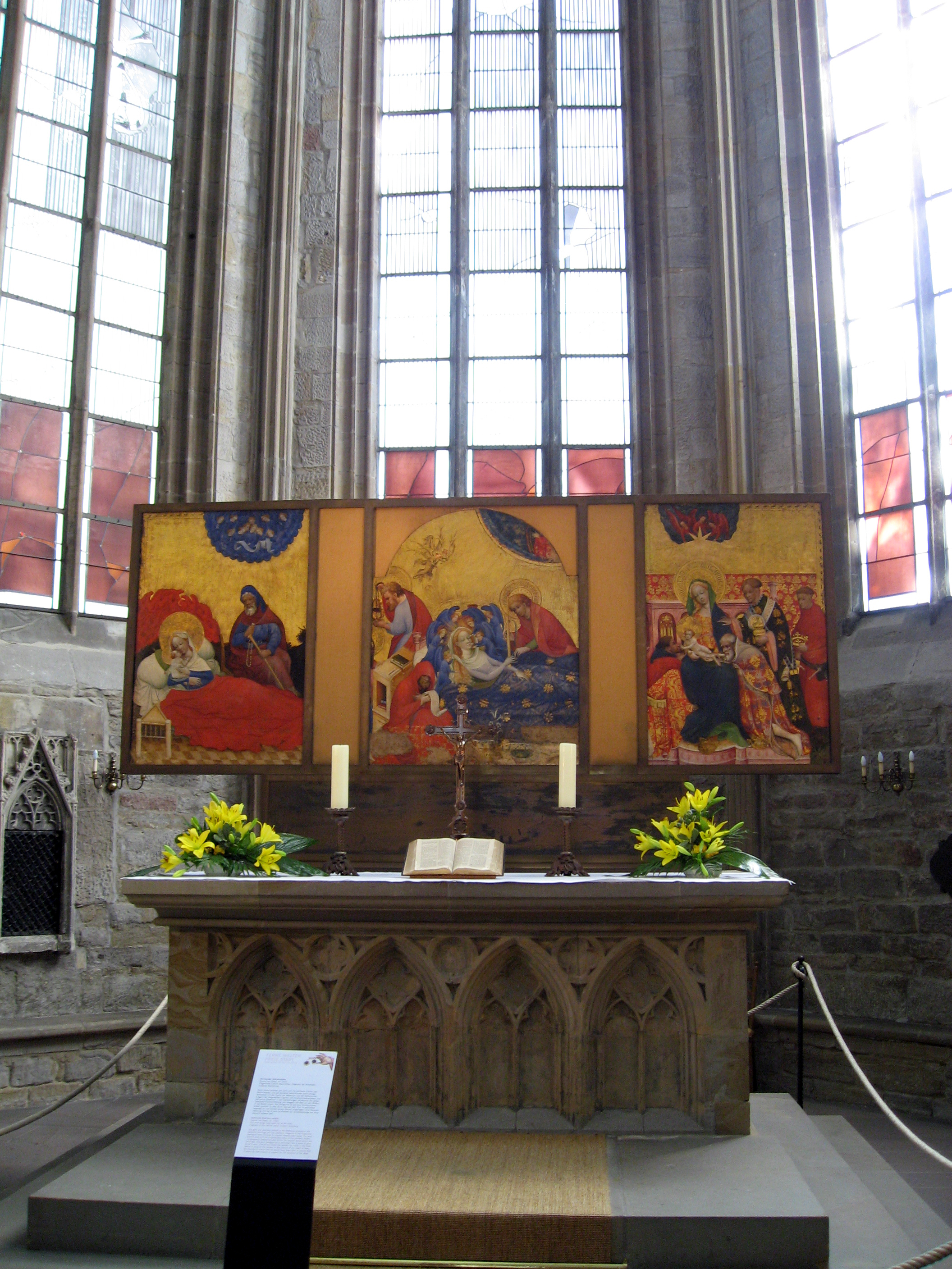 Marienkirche Dortmund, Marienaltar, Konrad von Soest, Mensa und Chor